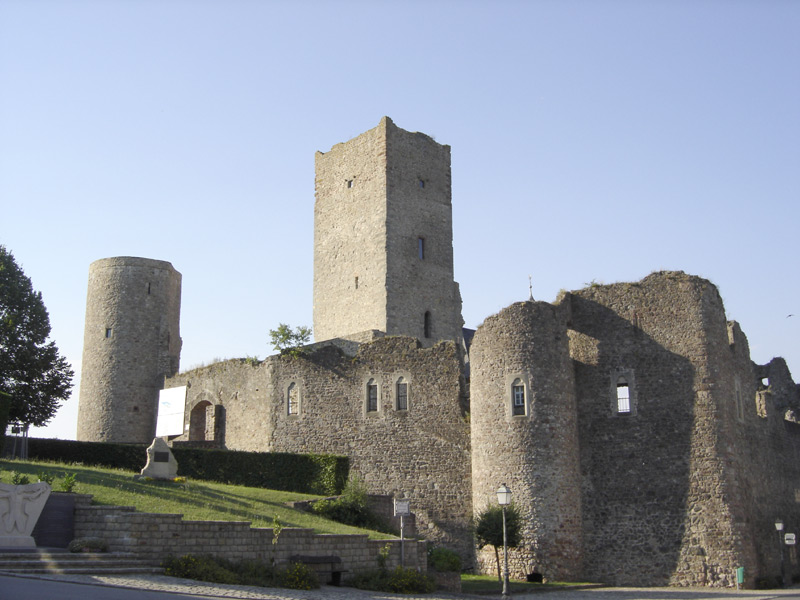 D'Siicht op d'Useldenger Buerg (Lëtzebuerg)